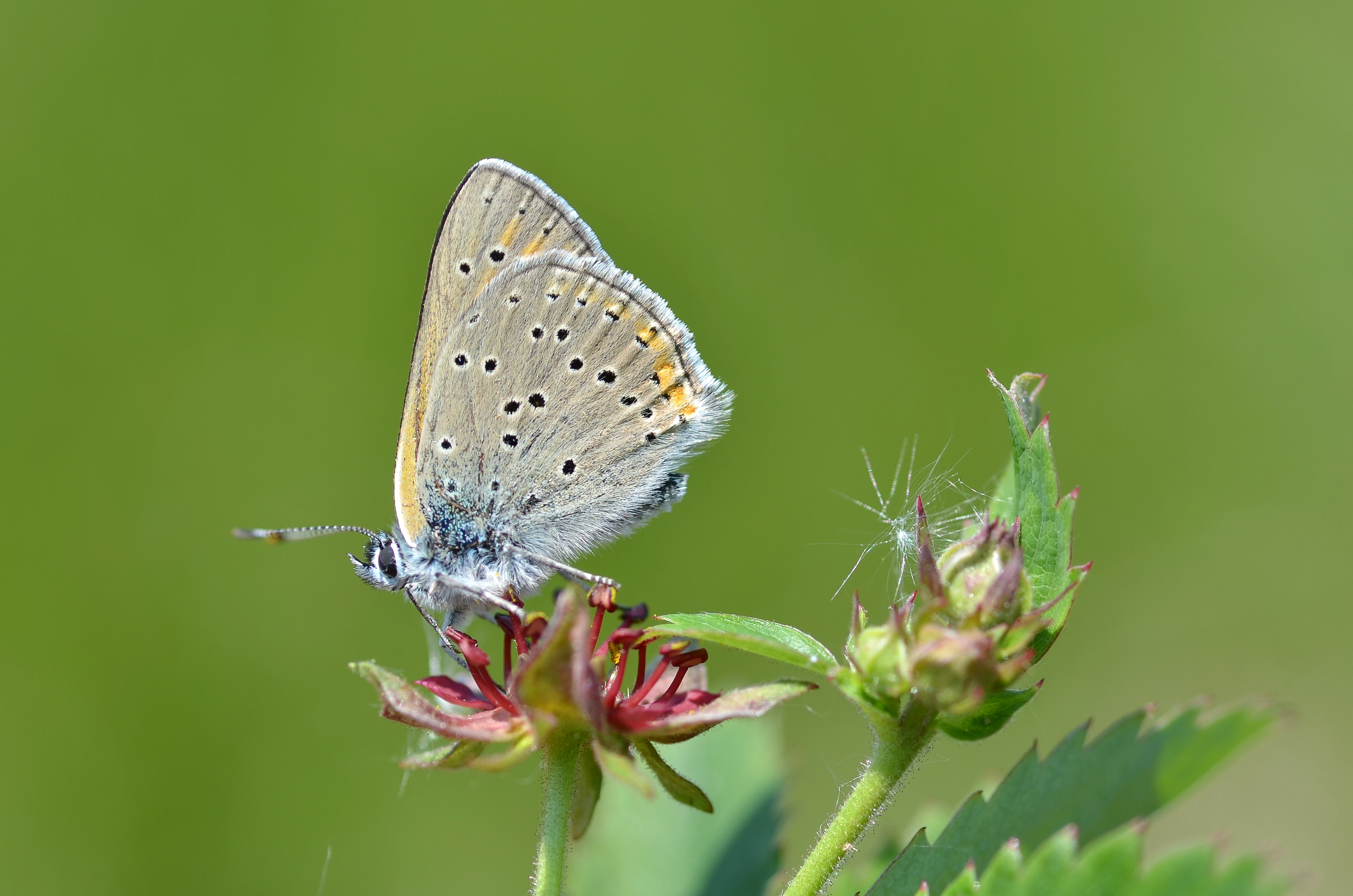 Lycaena hippothoe